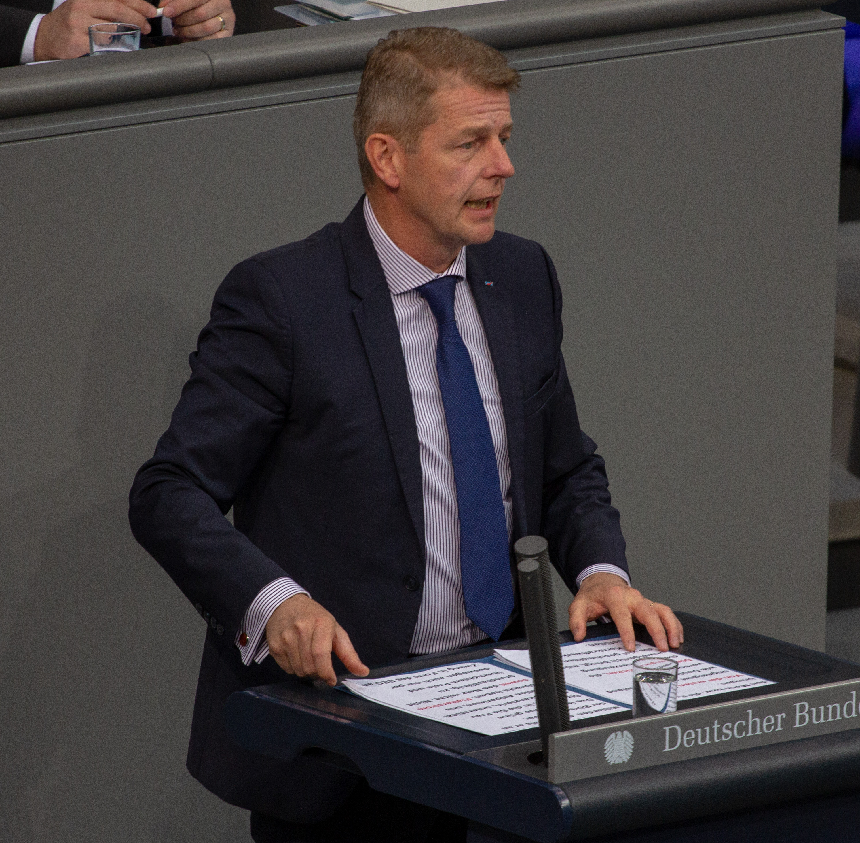 Karsten Hilse, Mitglied des Deutschen Bundestages, während einer Plenarsitzung am 9. Mai 2019 in Berlin.